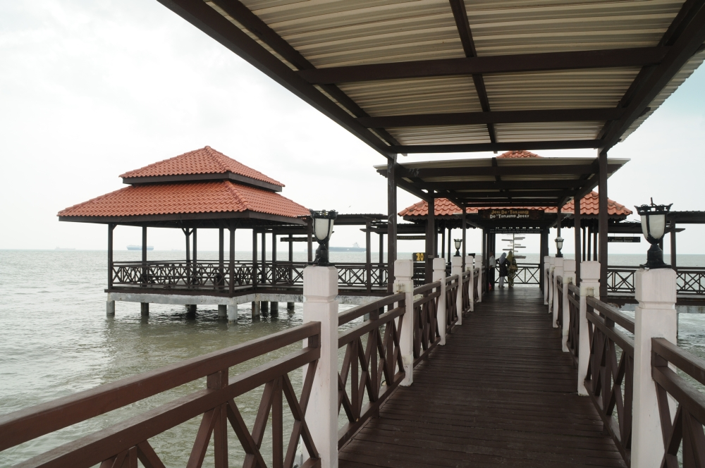 Tanjung Piai Jetty, Johor , Malaysia